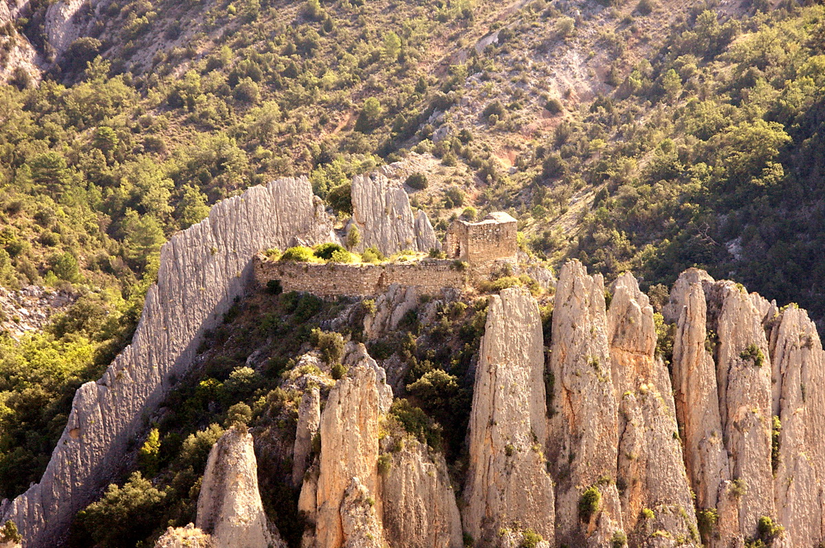 Ermita de Sant Vicens de Finestres